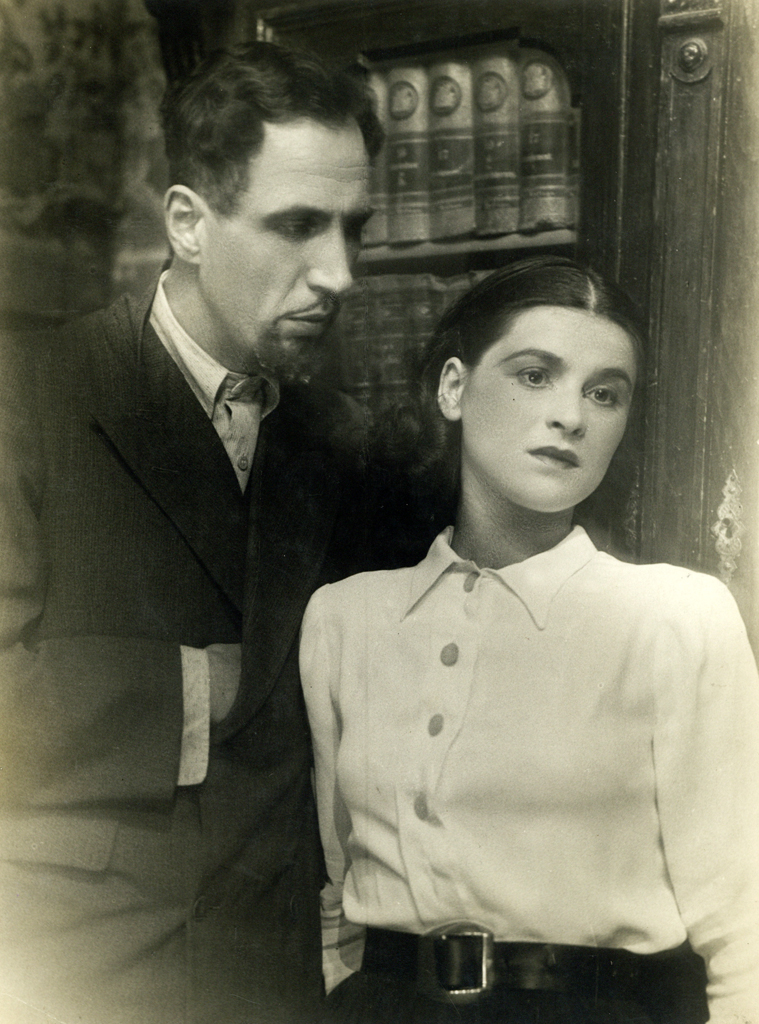 Ivan Cankar, Kralj na Betajnovi, Narodno gledališče v Mariboru. Na fotografiji: Vladimir Skrbinšek (Maks), Vladoša Simčič (Nina).